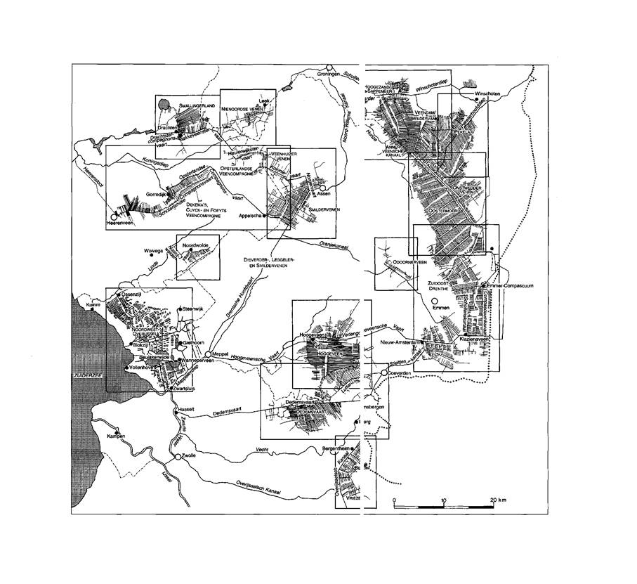 Verveningsystemen in Noord Nederland